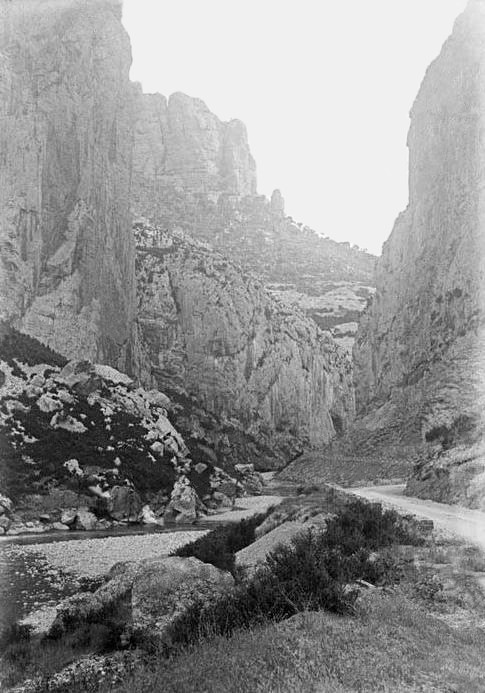 Imatge